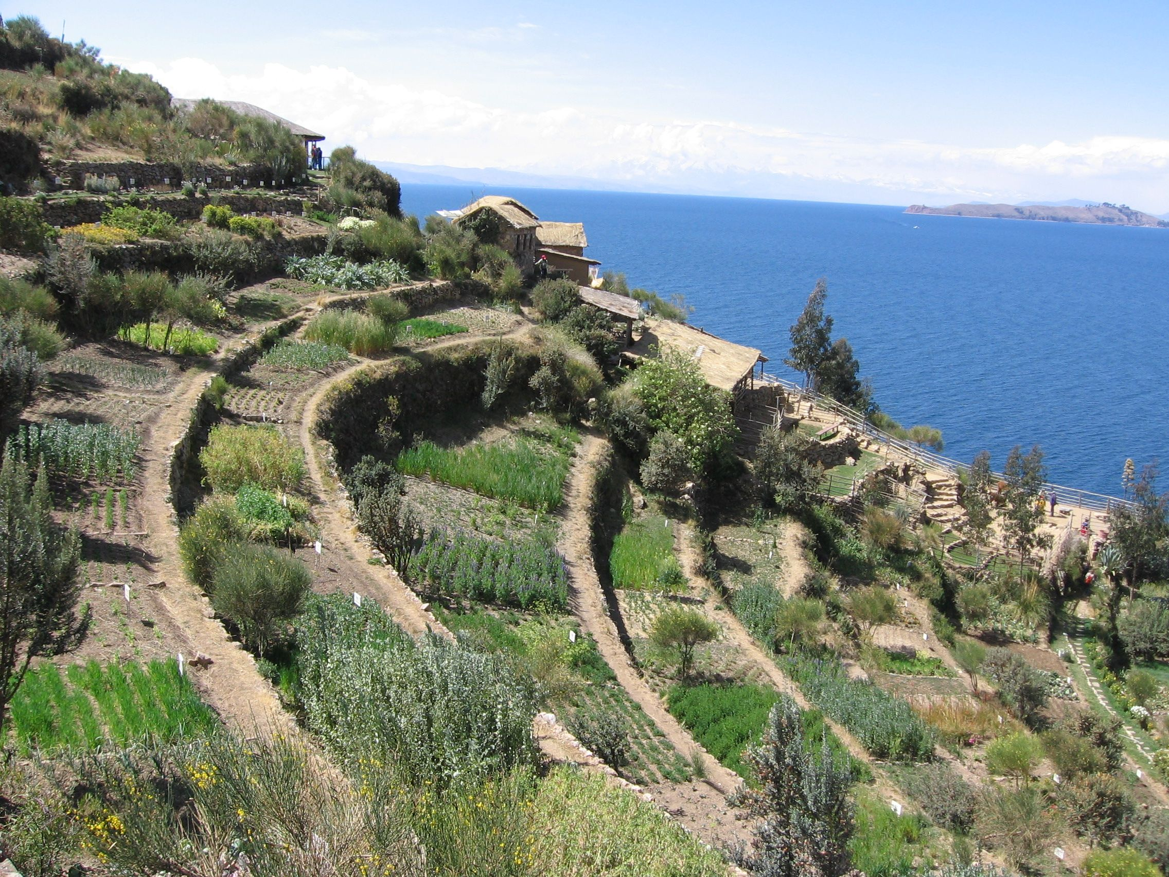 Terrassen des Inti-Wata-Komplexes